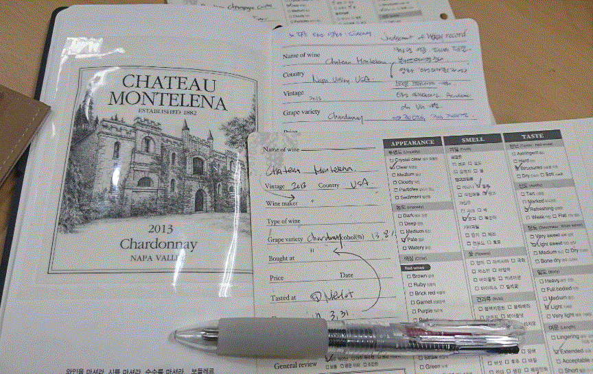 Tasting note 테이스팅 노트